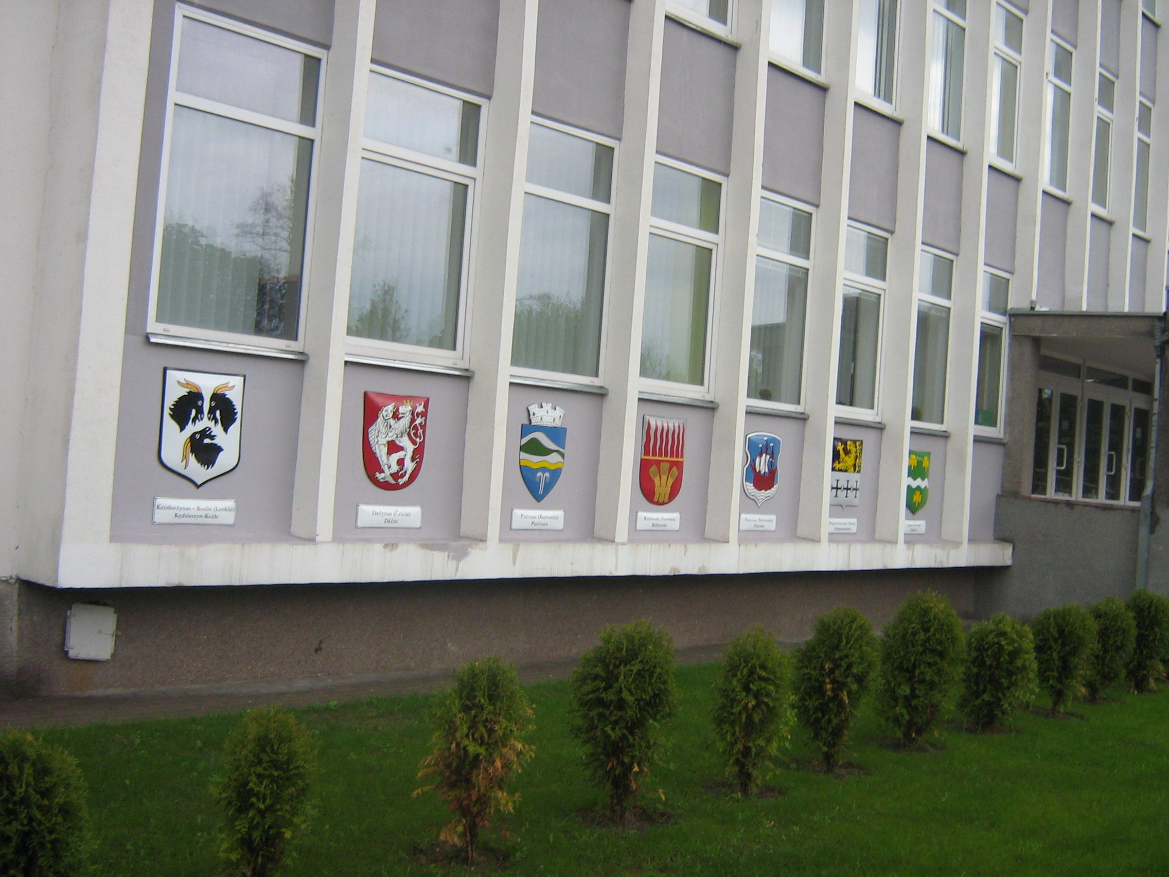 Jonavos miestai partneriai